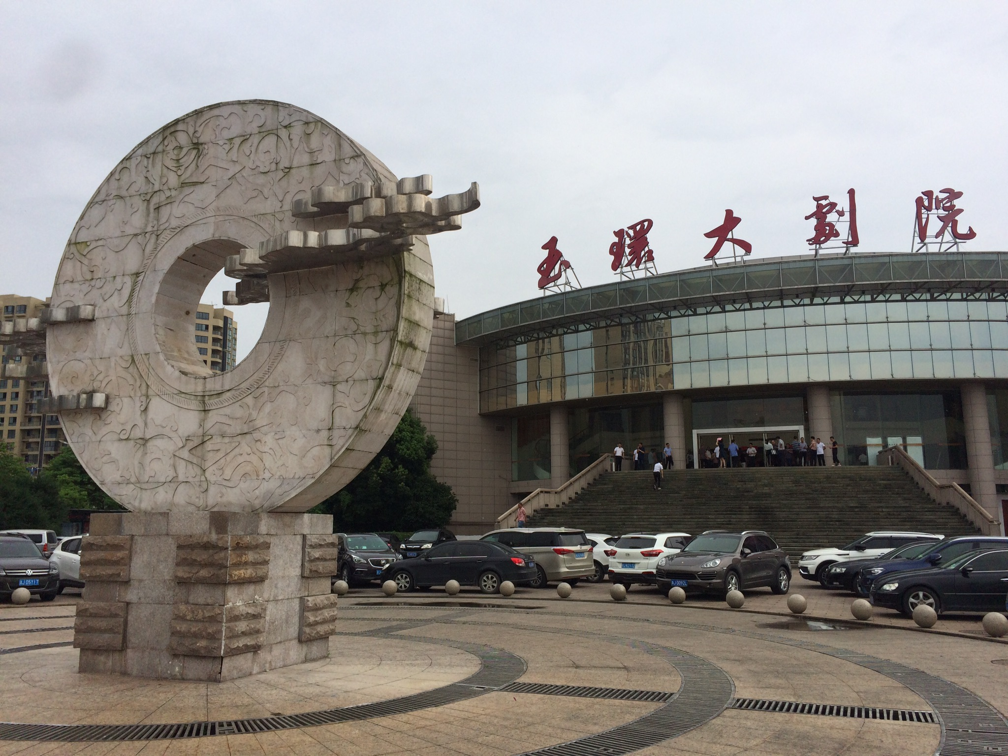 中文（中国大陆）: 2019年7月的玉环大剧院